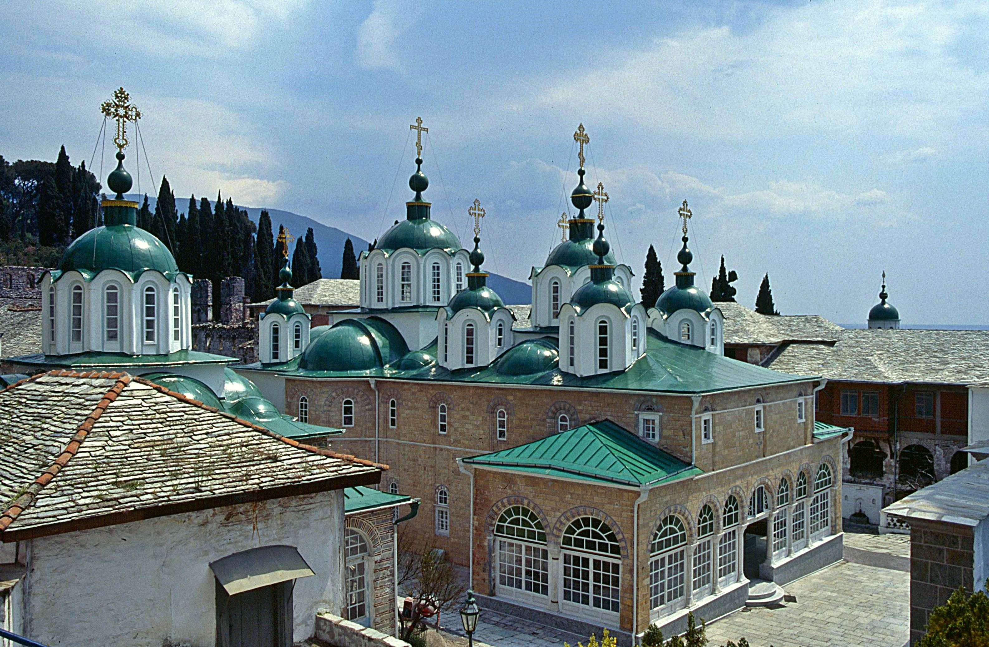 Moni Agiou Panteleimonos (Athos)